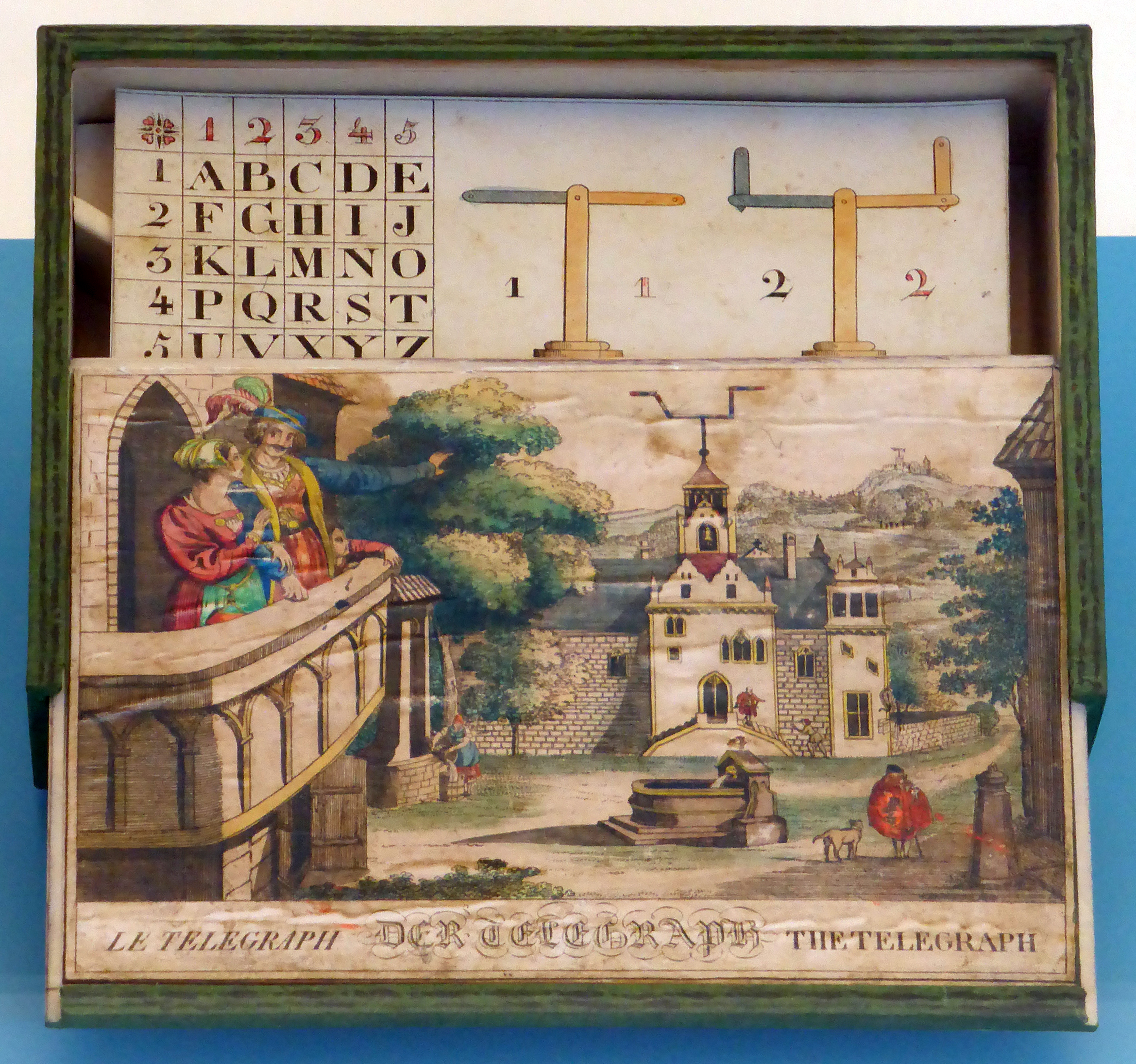 Der Telegraph, Kinderspiel zur optischen Telegrafie, 1. Hälfte des 19. Jahrhunderts (Replik) im Deutschen Technikmuseum in Berlin. Wikipedianische KulTour am 10. Oktober 2015 in der Ausstellung des Museums.